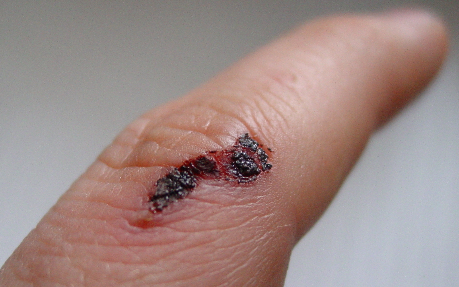 see Exudate